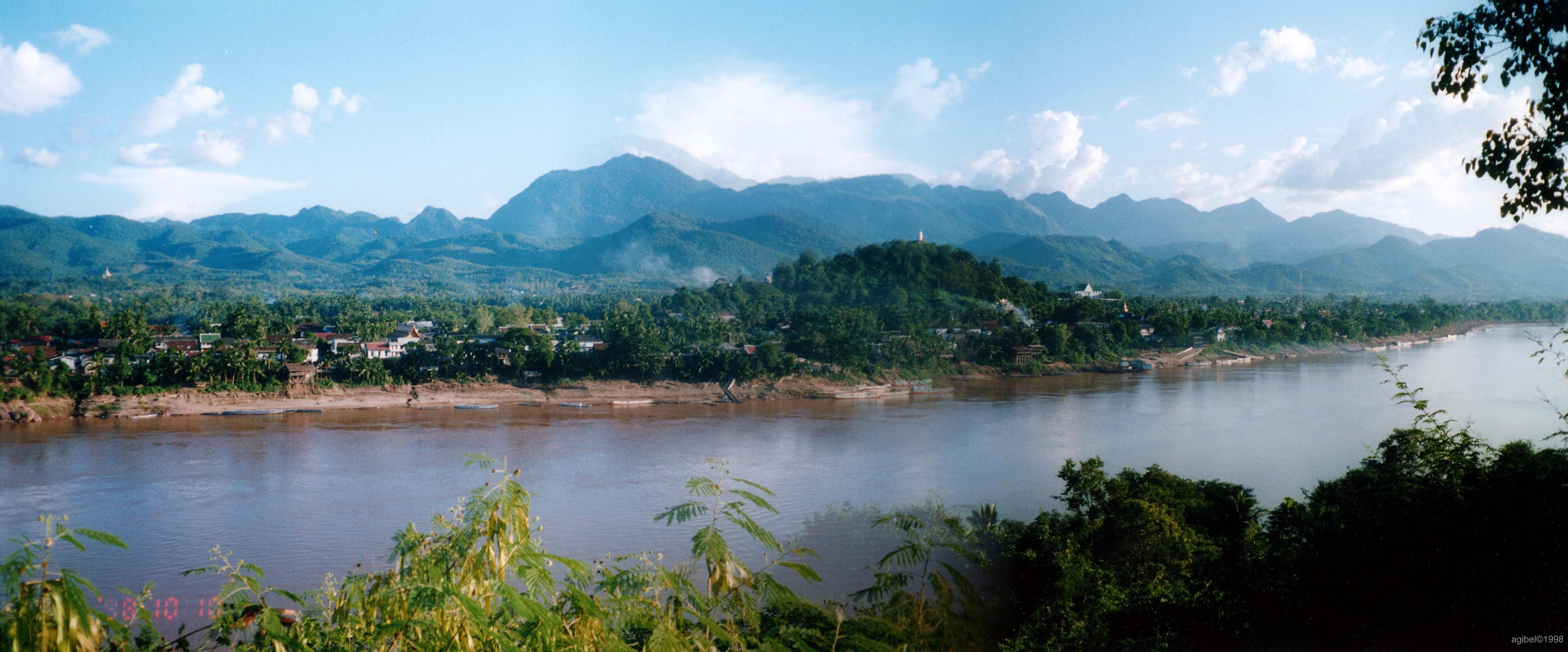 Luangphabang vom rechten Mekongufer aus gesehen (Panoramamontage)